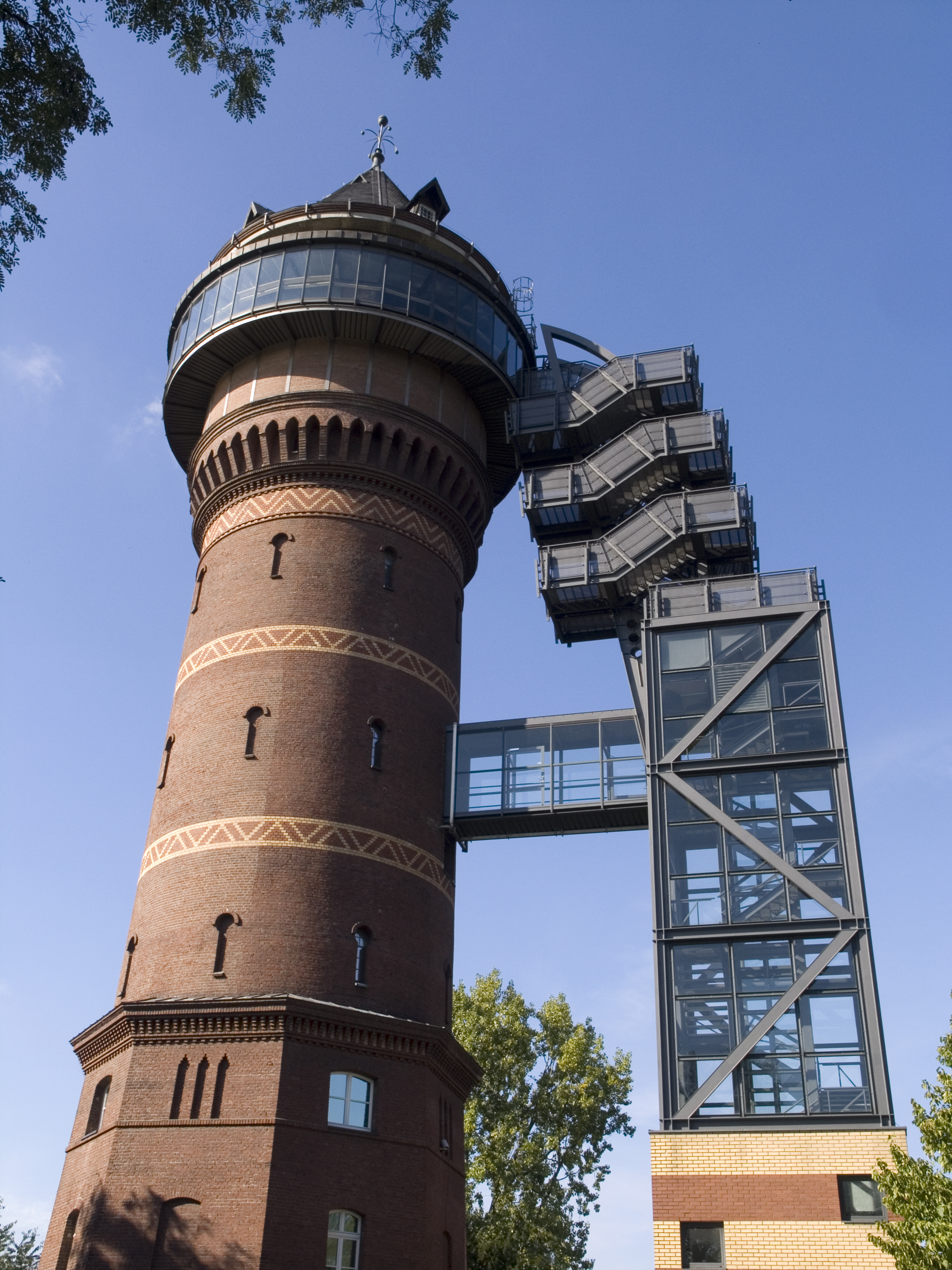 Aquarius Wassermuseum в г. Мюльхайм-на-Руре (Северный Рейн-Вестфалия)